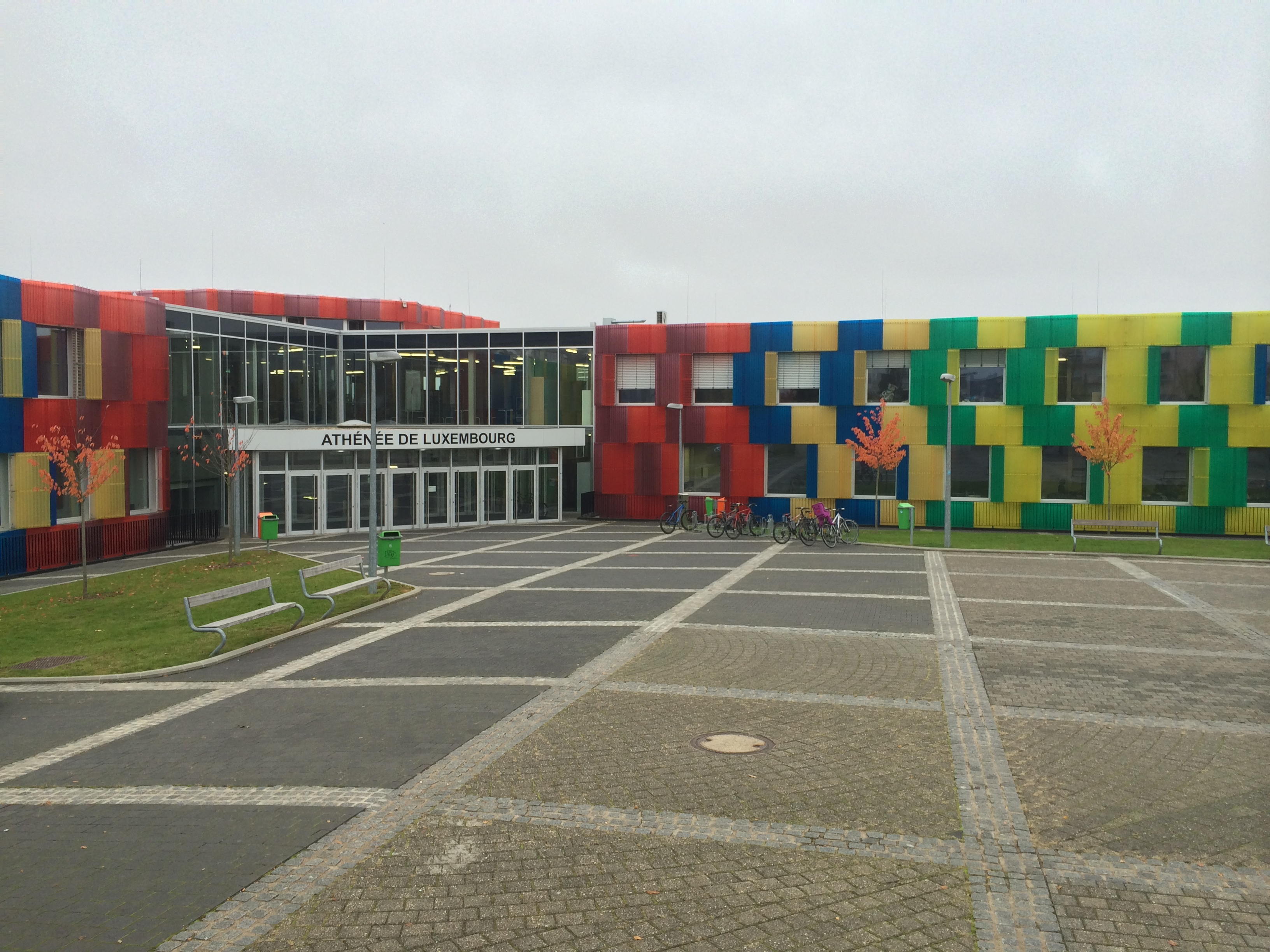 Structure provisoire de l'Athénée de Luxembourg